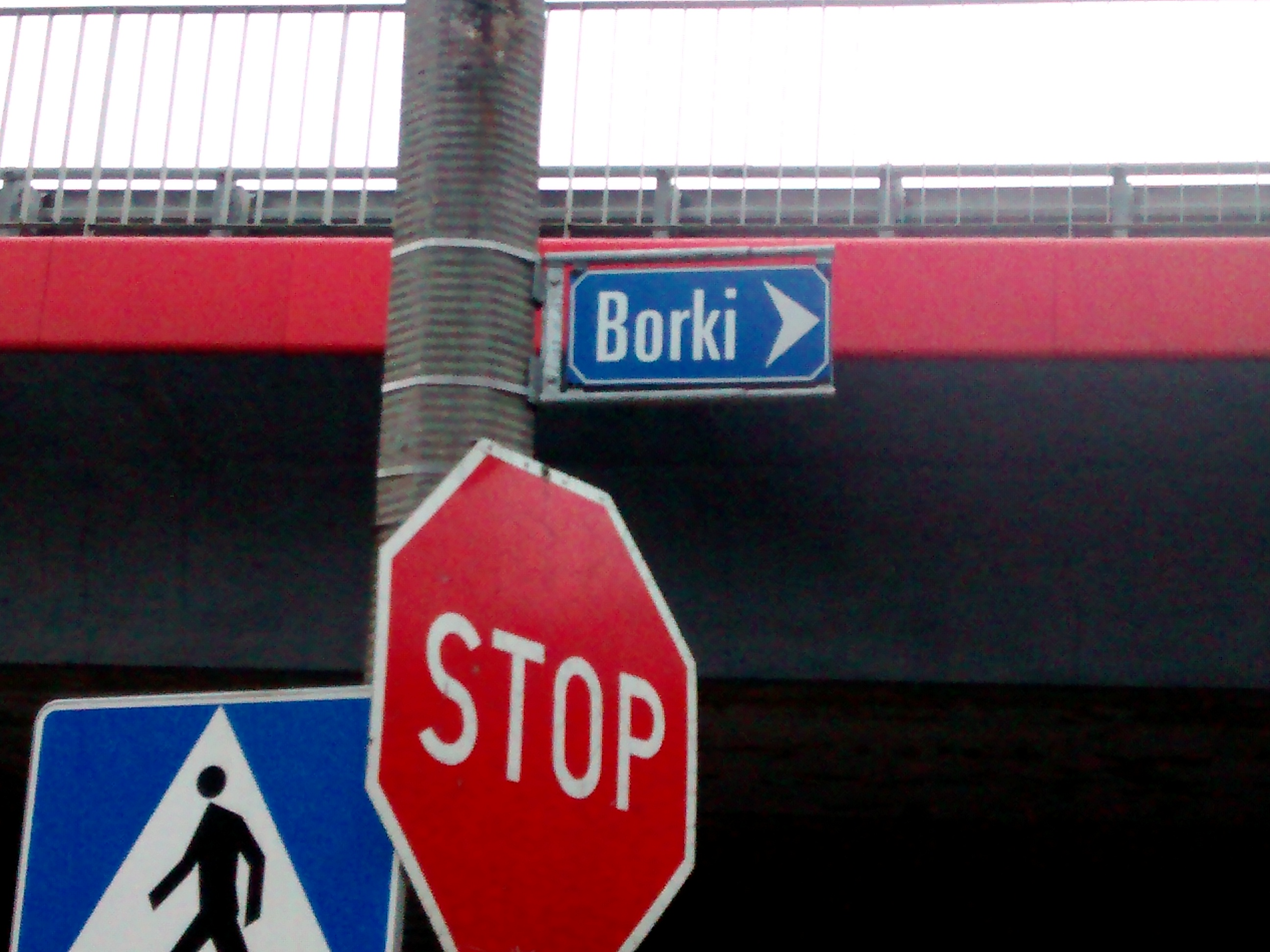 ul. Borki w Katowicach